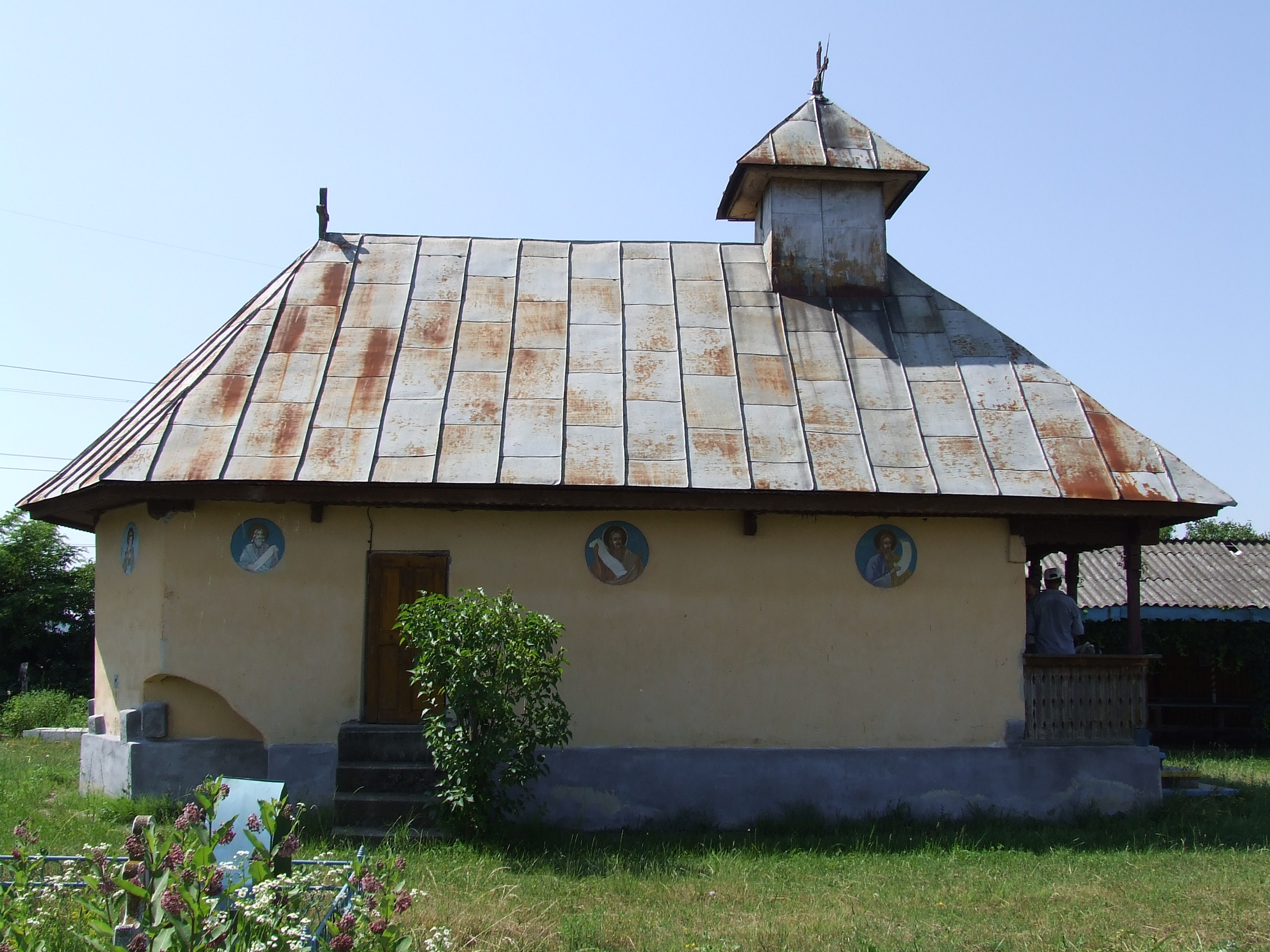 Biserica de lemn din Vidin, judeţul Gorj.